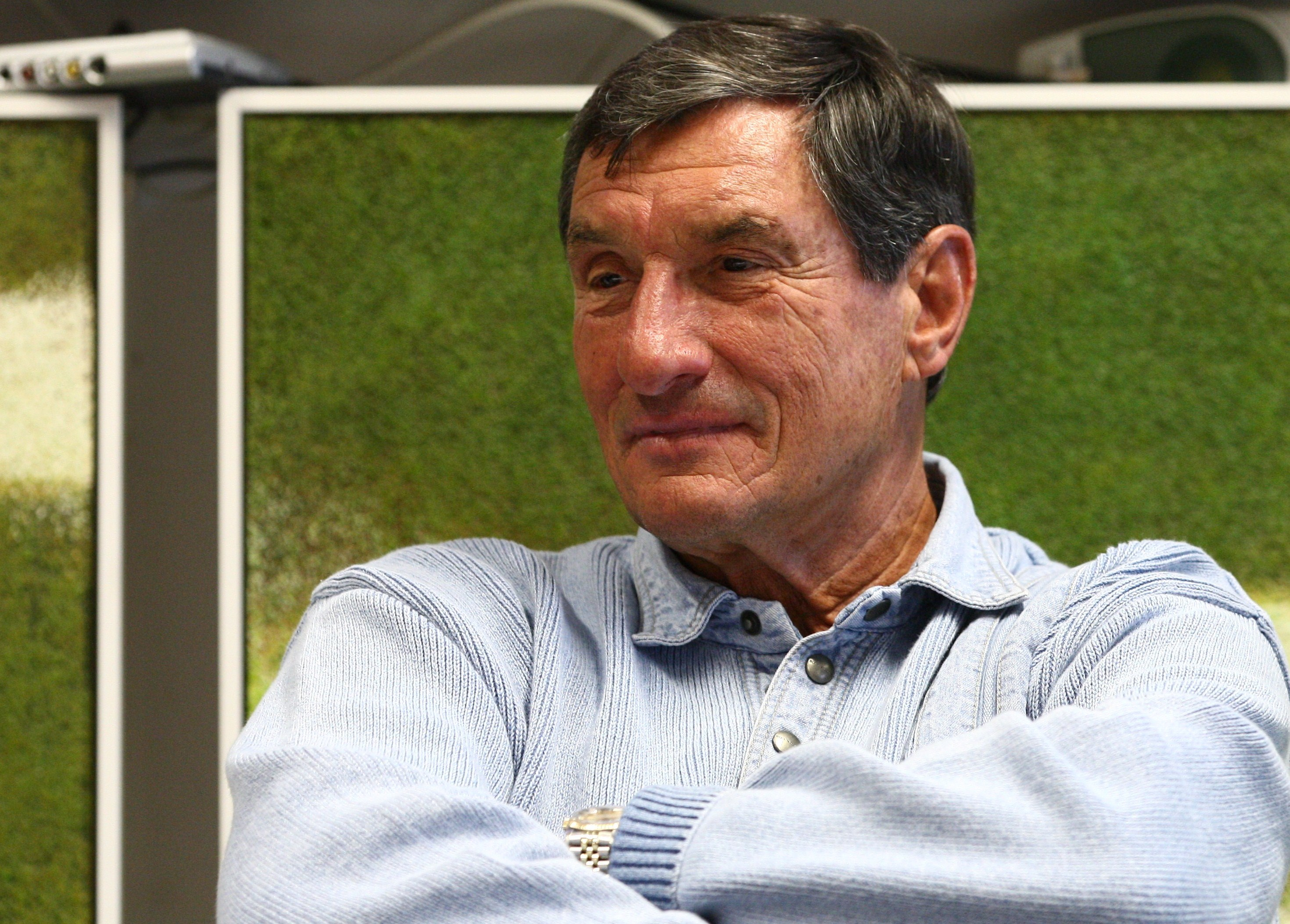 Lothar Buchmann im Eintracht Frankfurt Museum 2011